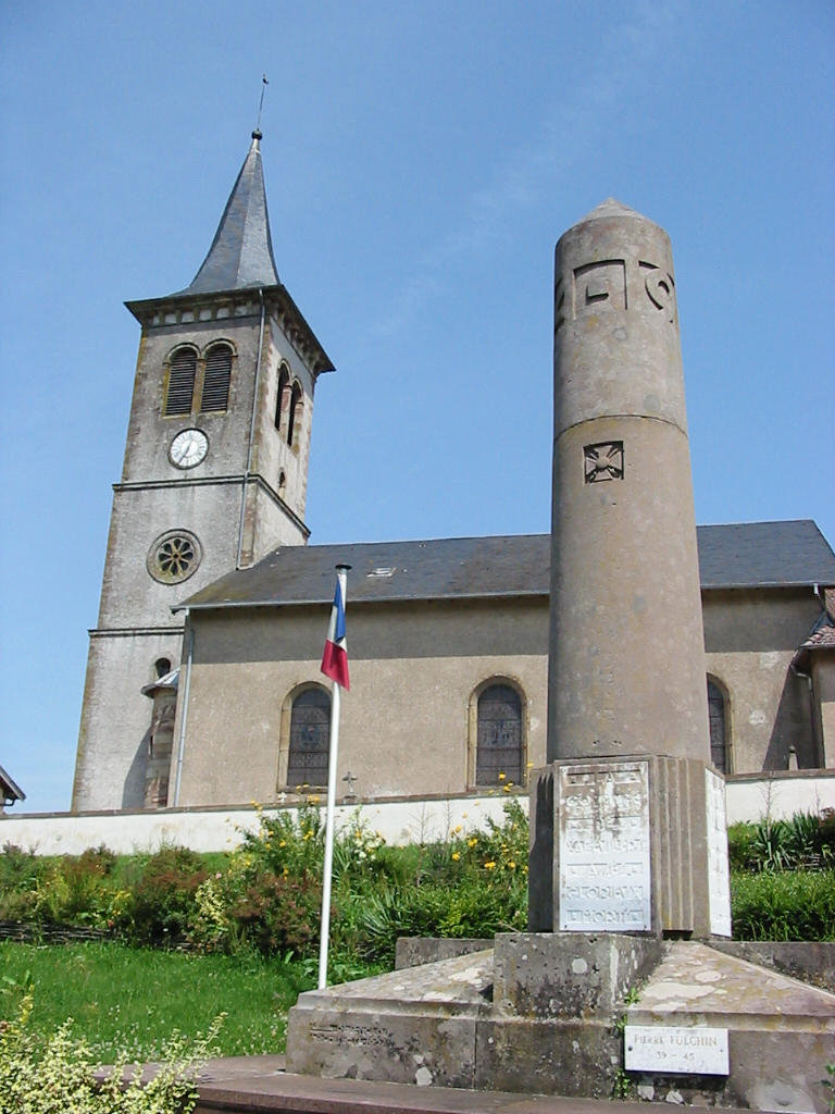 Xaffévillers, commune des Vosges : église et monument